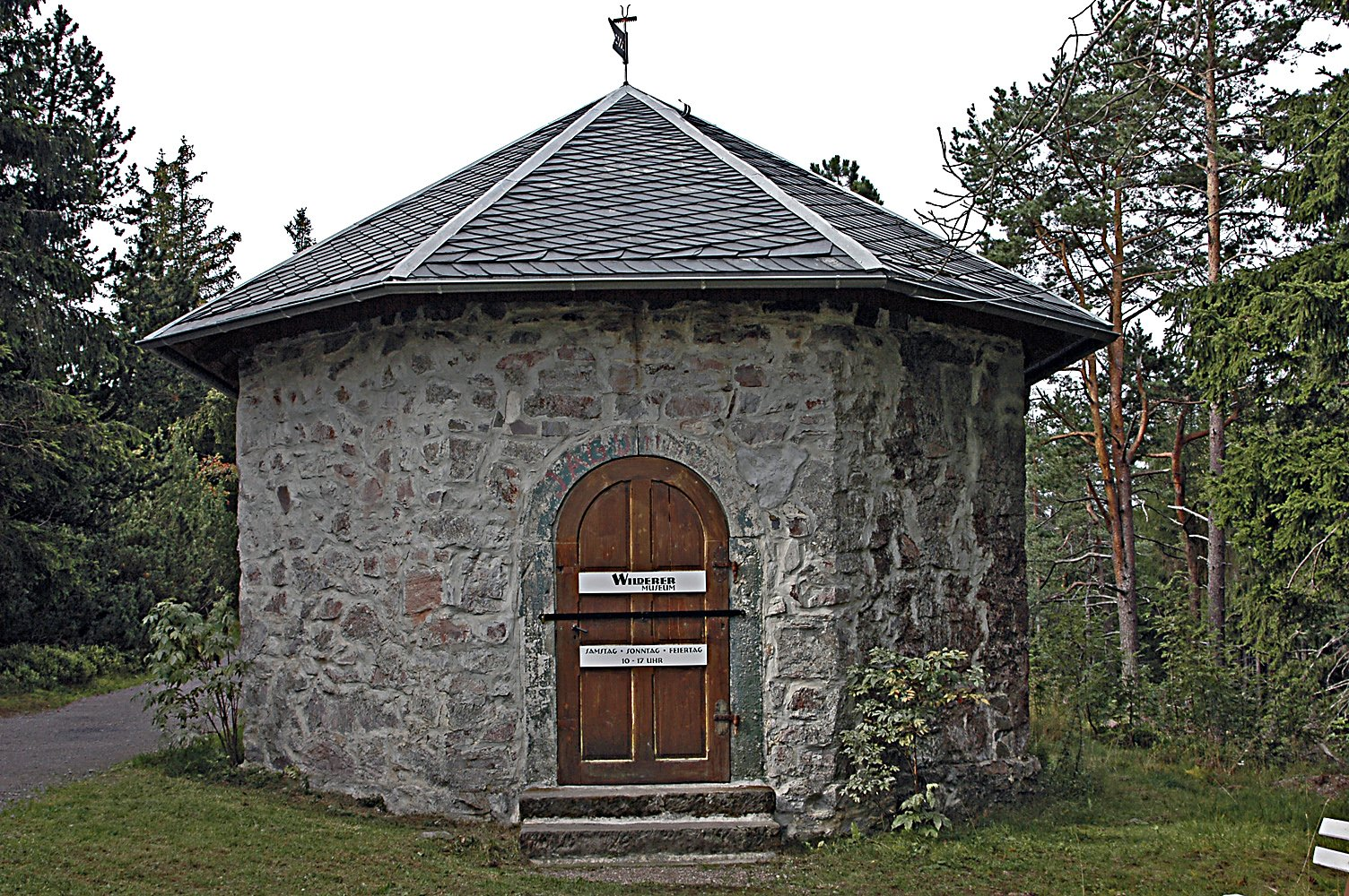 Ehem. Wilderer-Museum (2004-2010) auf dem Langen Berg, Gehren